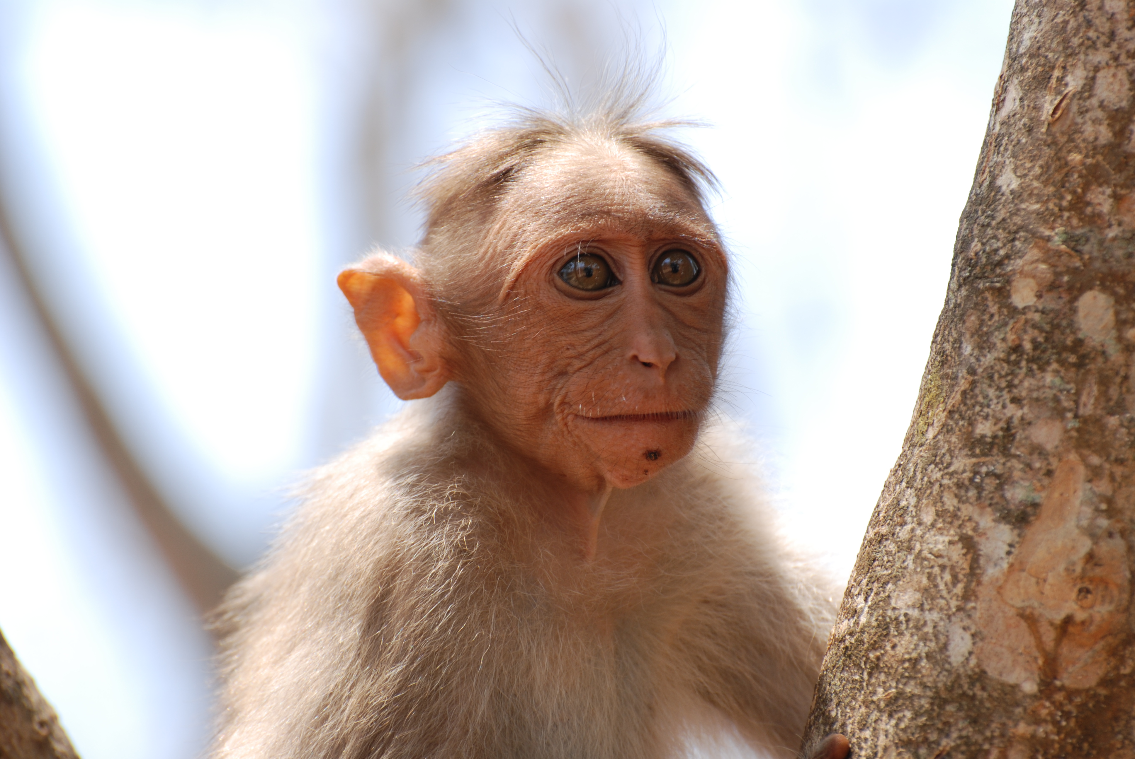 young Bonnet Macaque (Macaca radiata), Karnataka, India